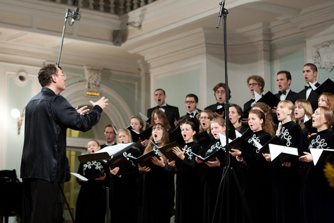 This work is free and may be used by anyone for any purpose. If you wish to use this content, you do not need to request permission as long as you follow any licensing requirements mentioned on this page.